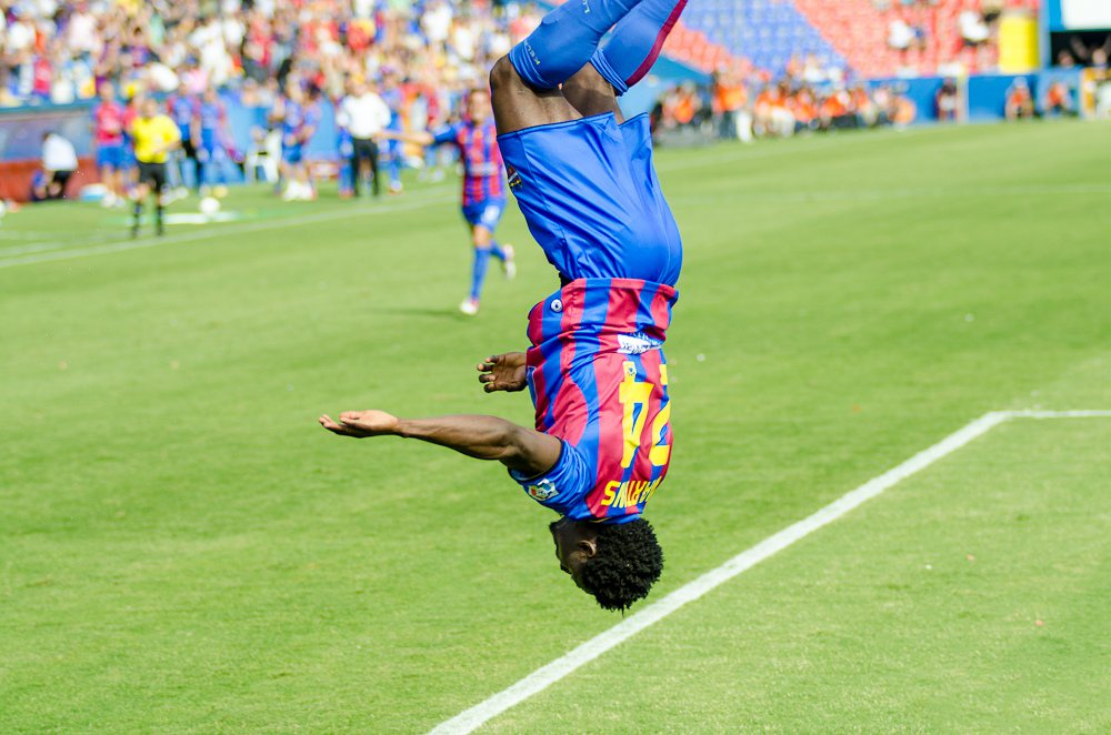 El jugador granota Obafemi Martins celebra un gol davant el València.